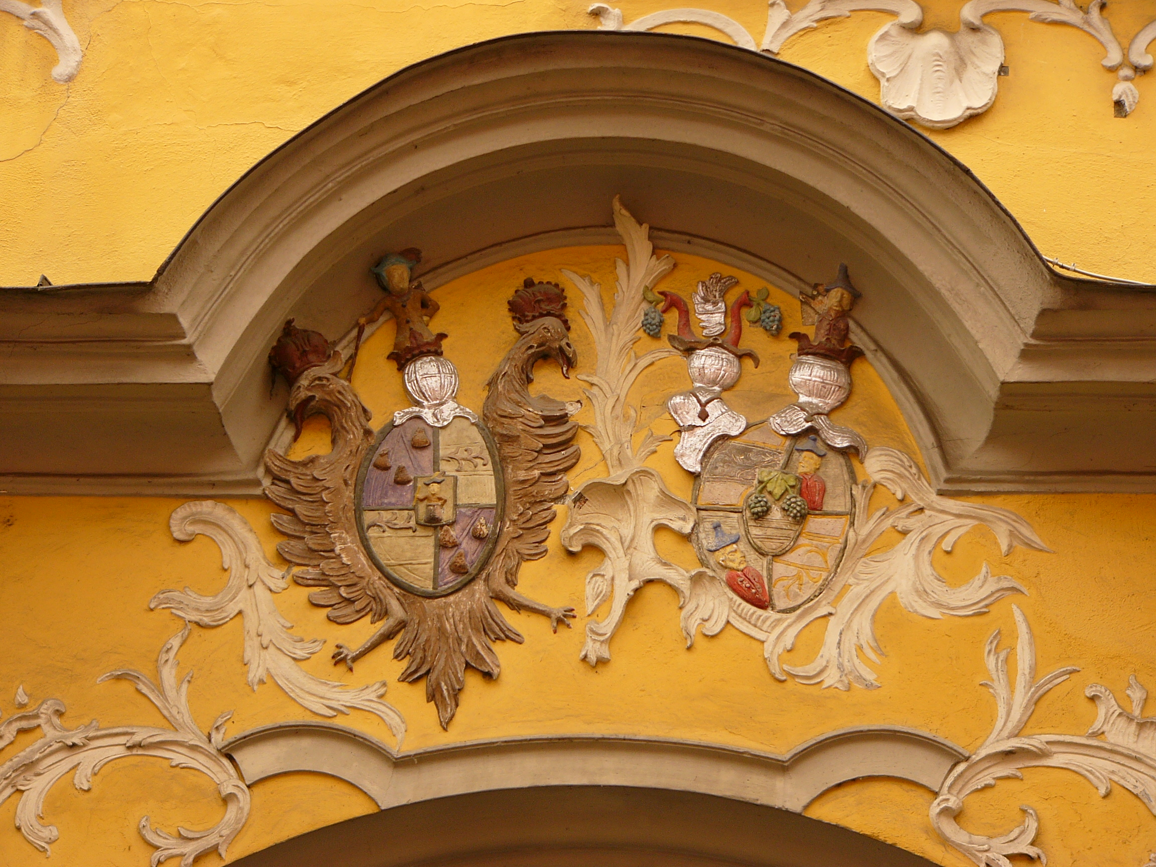 Ehem. Palais Pettenkofer; dann Hofbräuhaus, stattlicher dreigeschossiger Bau zu sechs Achsen, reicher Fassadenschmuck, im Kern 1. Hälfte 17 Jahrhundert, sonst um 1770 - Wappen über dem Portal: Allianzwappen Johann Wilhelm von Pettenkofer und Ehefrau geb. Kammerloher (aus Irnsing), um 1770. This is a photograph of an architectural monument.